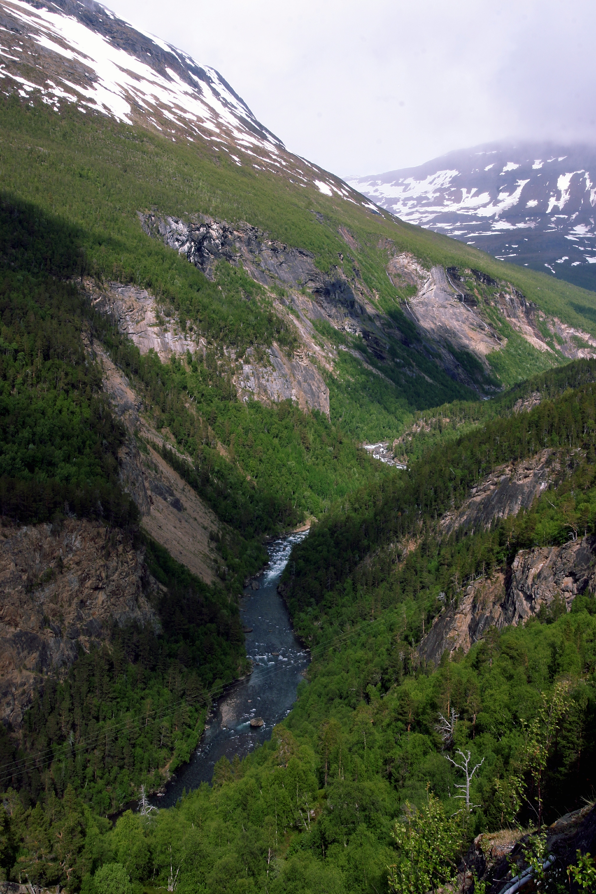 Oversiktsbilde Junkerdalsura og Junkerdalselva, i Saltdal kommune i Nordland fylke.